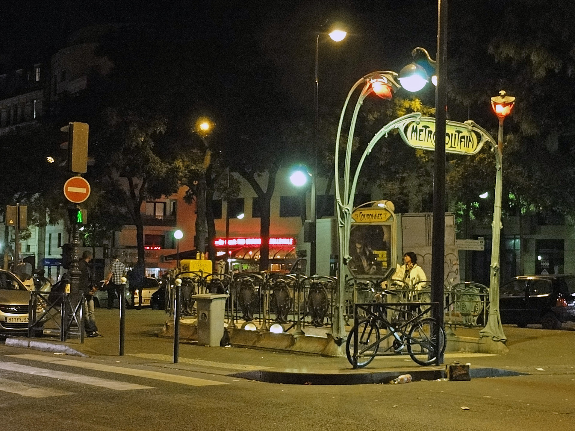 Entrée de la station Couronnes de la ligne 2 du métro de Paris, France.